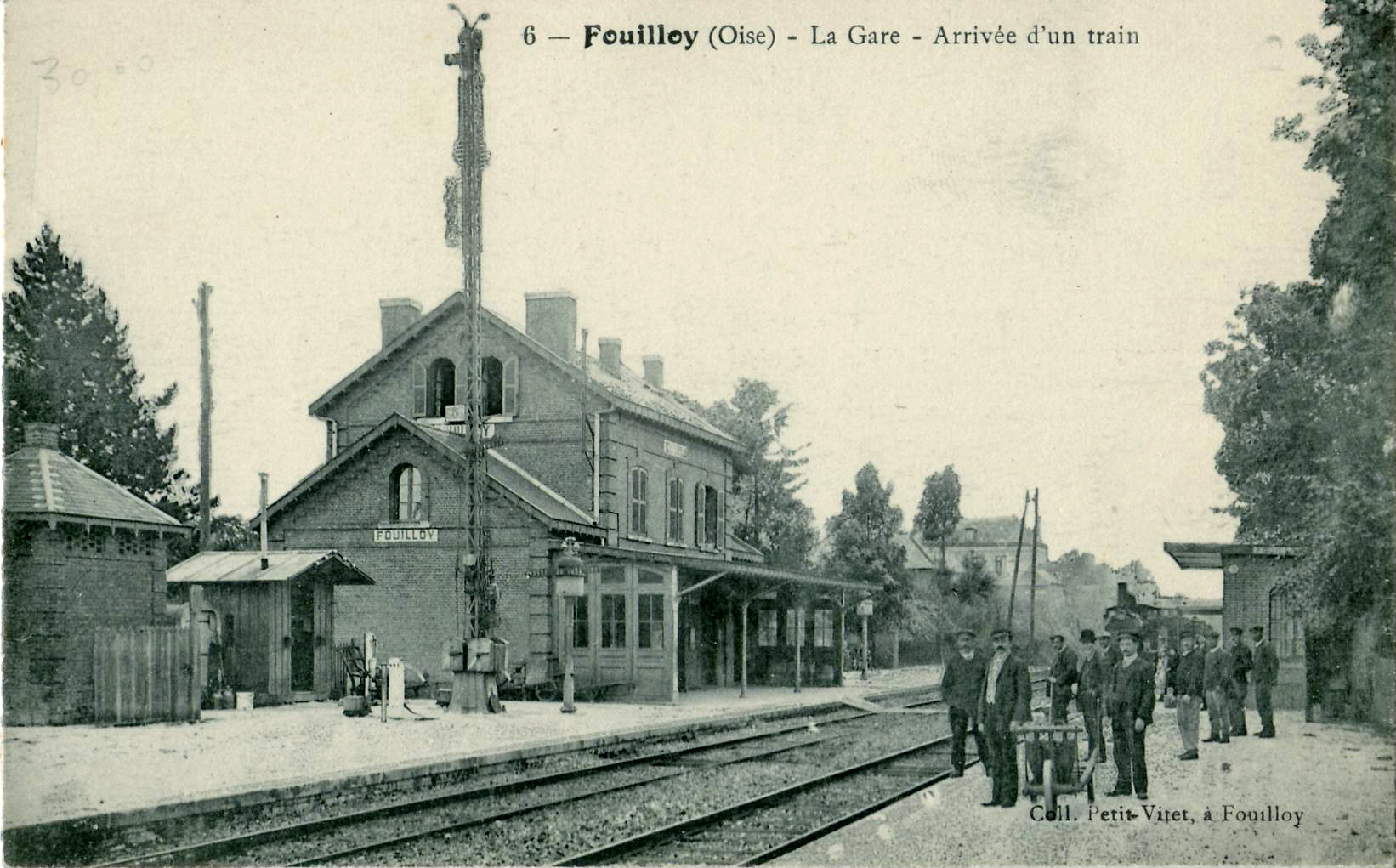 Carte postale ancienne éditée par Petit-Vitet à Fouilloy, n°6 : FOUILLOY - La Gare - Arrivée d'un train